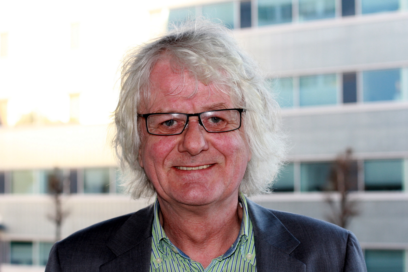 Per Inge Torkelsen i Stavanger april 2014